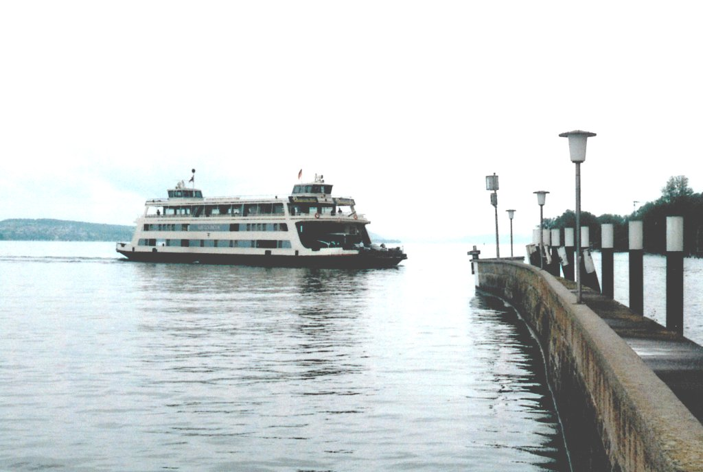 Autofähre Kreuzlingen auf dem Bodensee